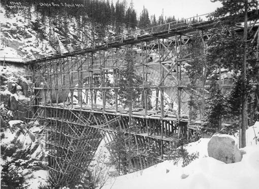 Bru over Orkla, muring pågår